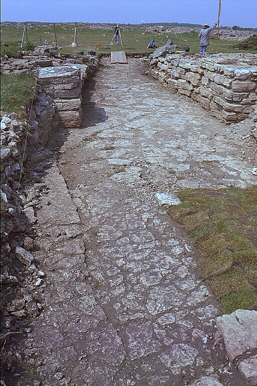 Fornborg, ingång. Motiv: Triberga borg Nyckelord: Riksintressen, Världsarv Kategori: Fornborg Fornborg, ingång.